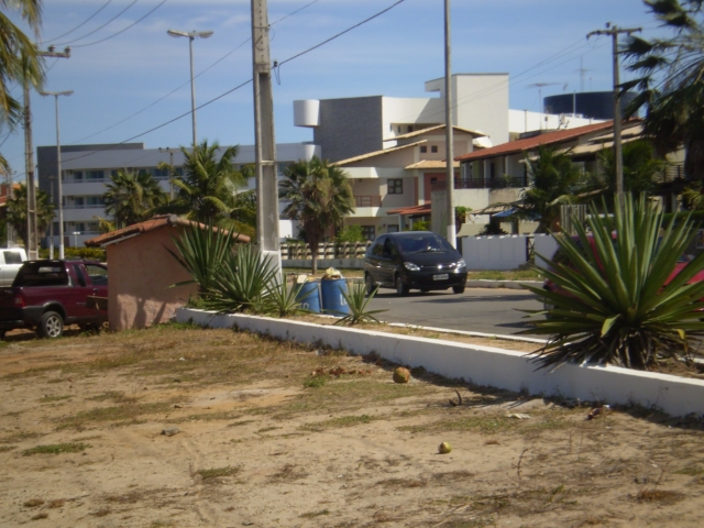 Casas e apartamentos em Pirangi do Norte.